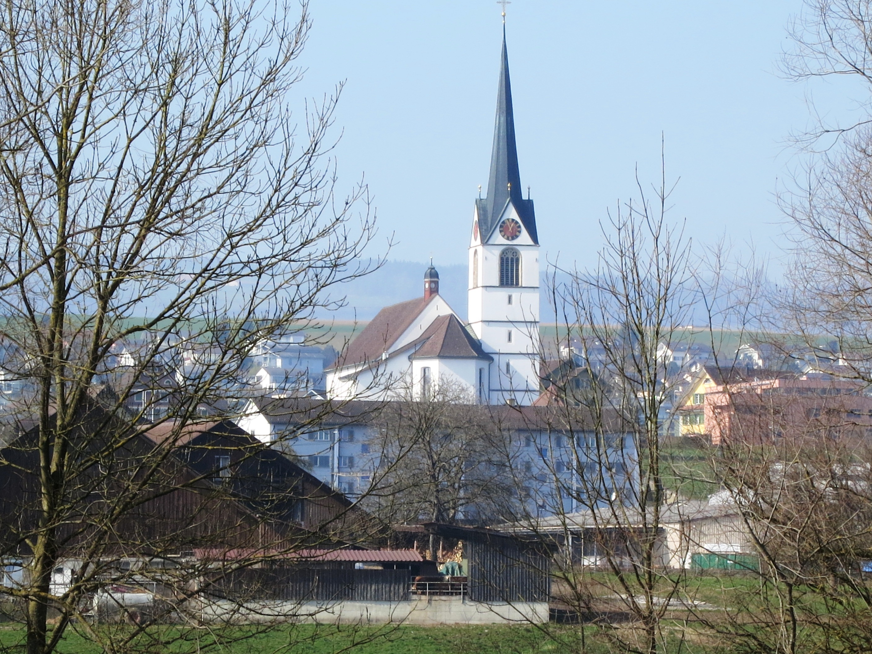 Kirche Sins AG, Schweiz